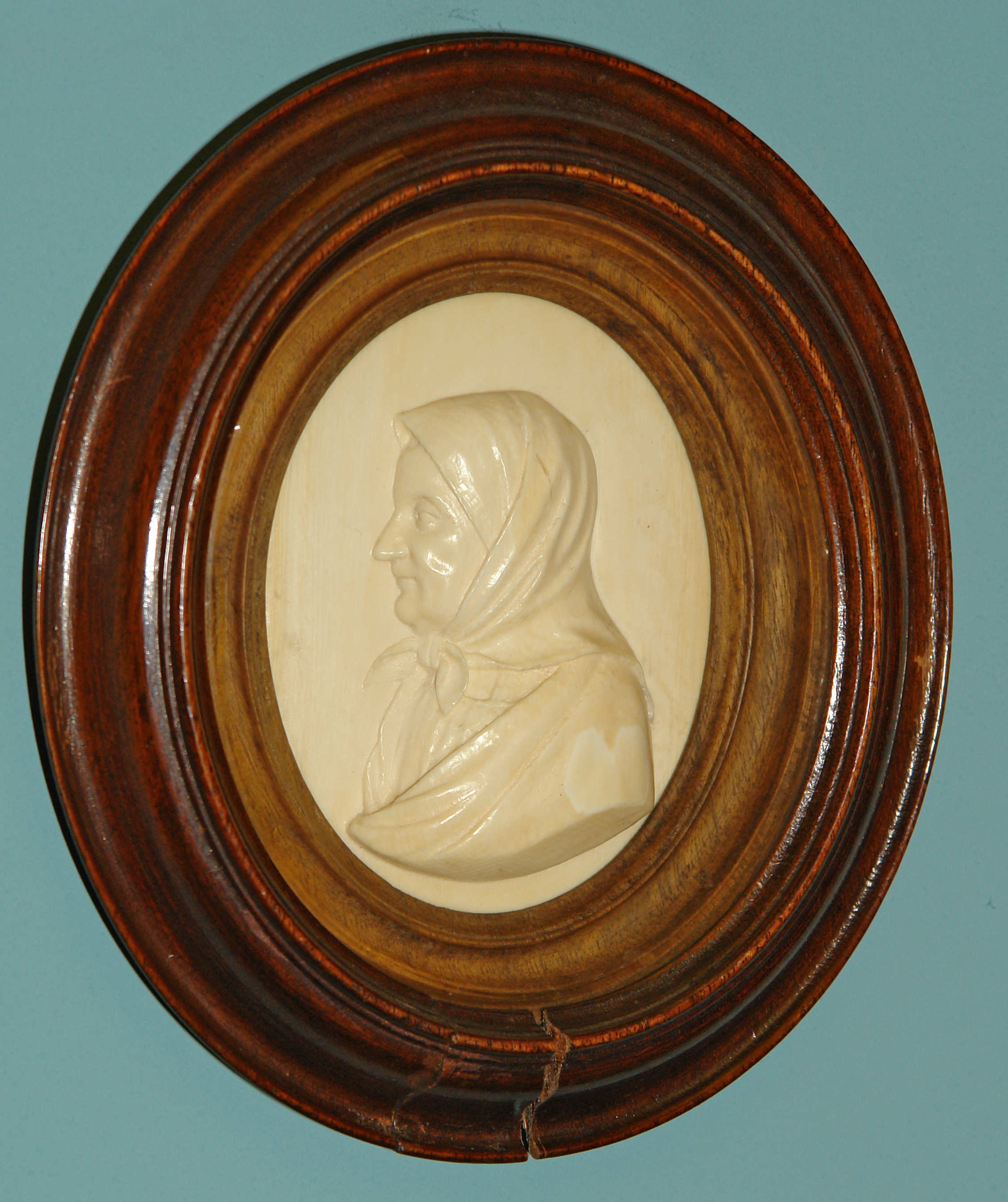 Я. П. Серяков. Арина Родионовна Яковлева (няня А.С. Пушкина) (1840ые). Горельеф, моржовая кость. Центральный музей А.С. Пушкина, Санкт-Петербург.